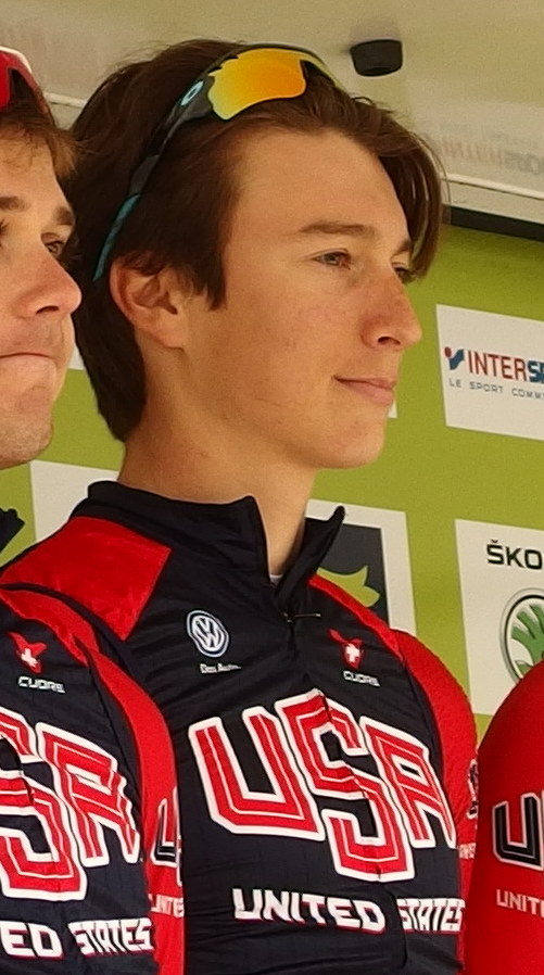 Tour de Bretagne 2015 - Présentation des équipes au départ de la troisième étape à Baud - Équipe nationale des États-Unis Depicted person: Neilson Powless